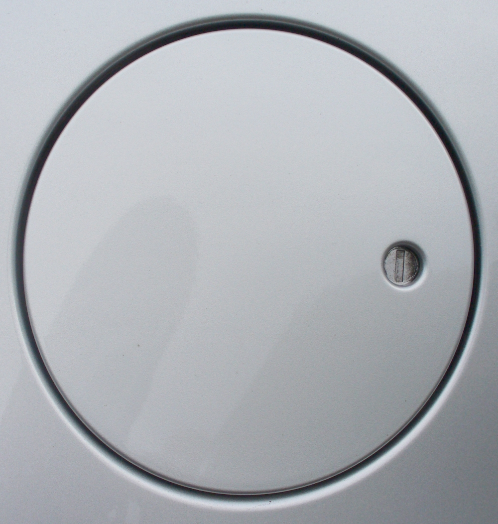 Tankdeckel Mazda2